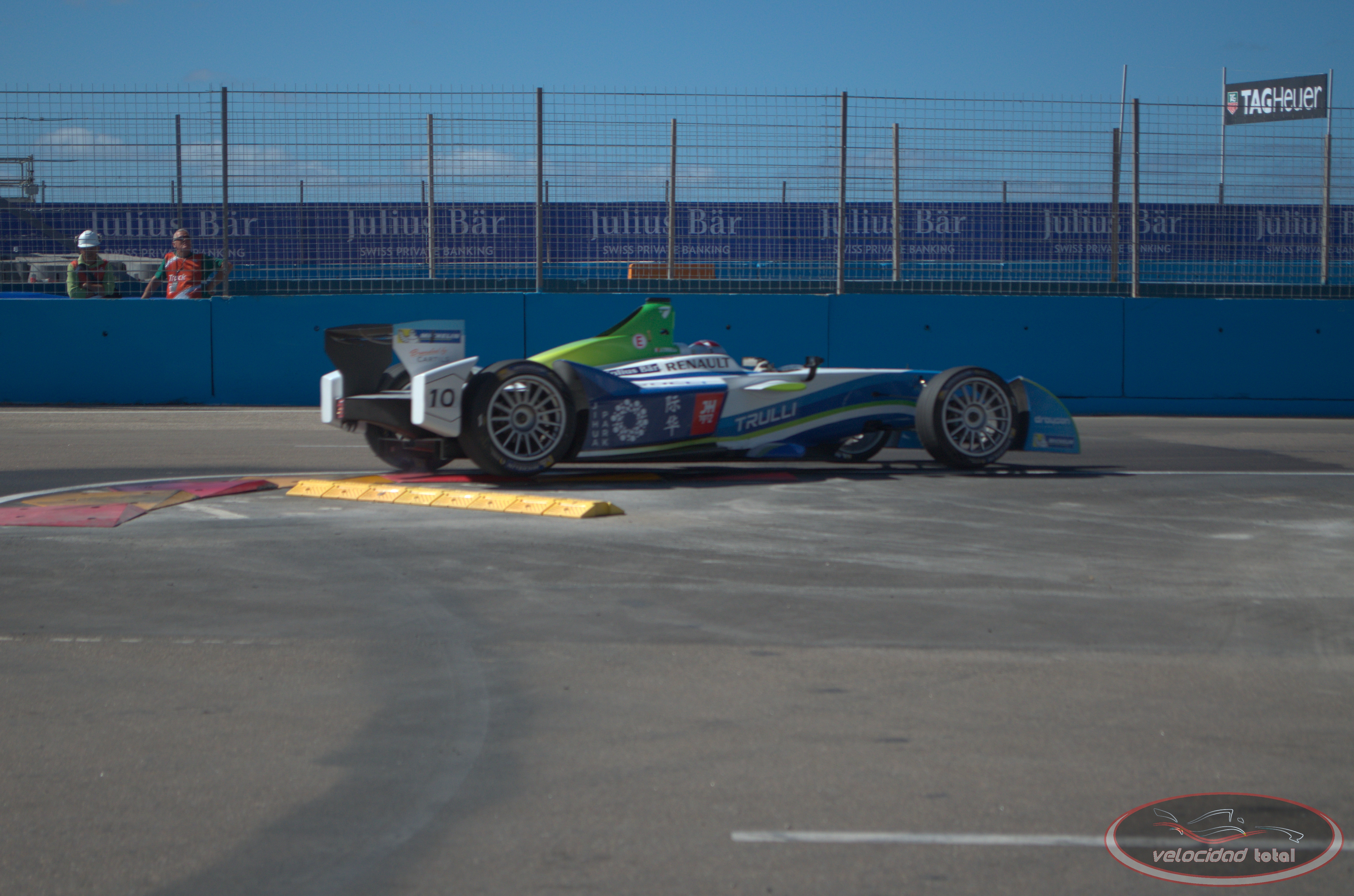 Solo se permite el uso de esta imagen mencionando a Velocidad Total como su autor. Imagen del equipo Trulli de Fórmula E, durante el Punta del Este ePrix de 2014.